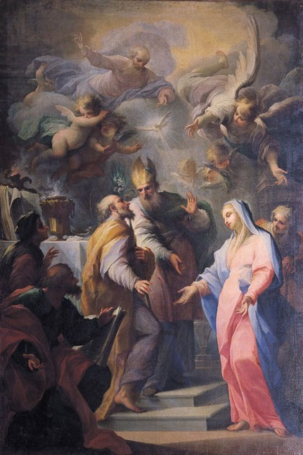 Esponsales de la Virgen, Santo Spitiro, Florencia